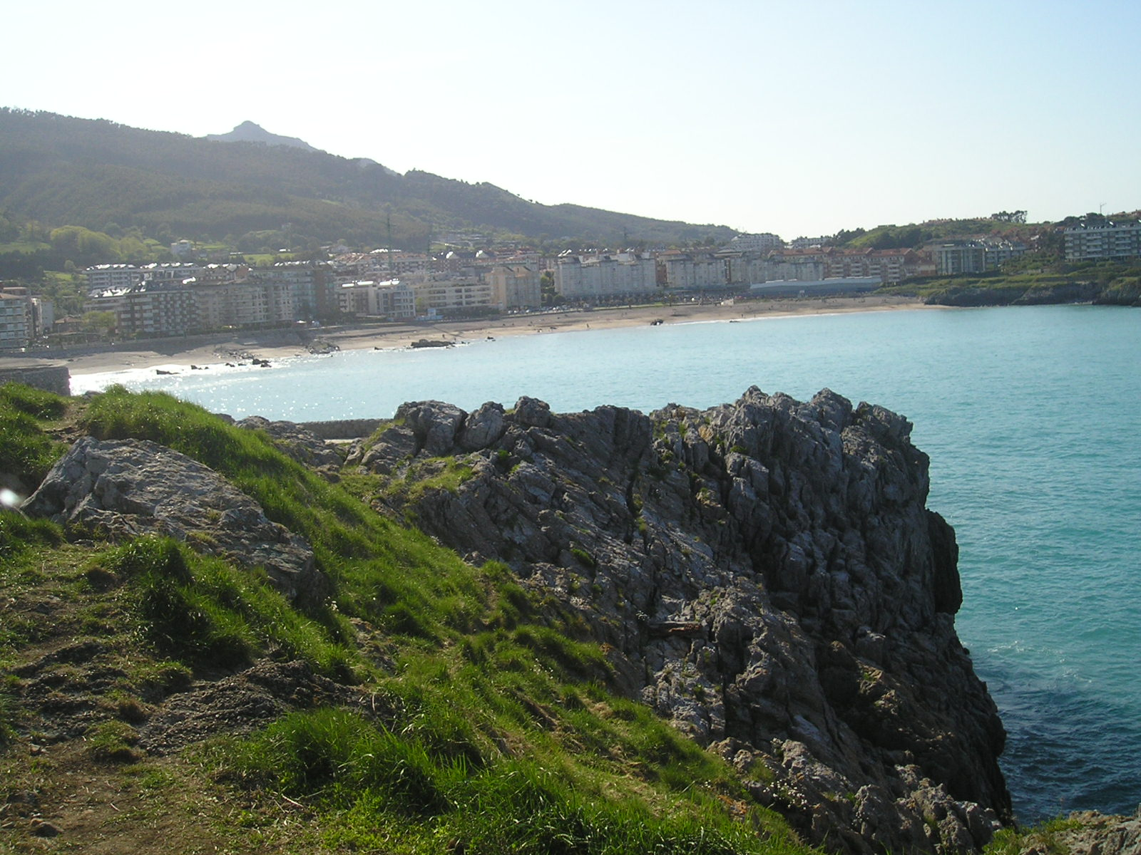 Playa de Ostende, en Castro Urdiales, localidad y municipio de Cantabria (España)